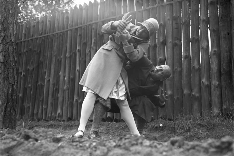 Wie schützt sich die alleinfahrende Autofahrerin vor einem Ueberfall! Durch Umknicken des Handgelenkes, ein äusserst schmerzhafter Jiu-Jitsu-Griff, wird der Verbrecher unschädlich gemacht.